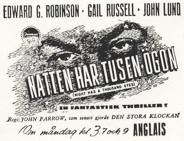 Biografannons för biograf "Anglais" lördagen den 20 november 1948 i Expressen